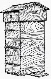 Ruche populaire de l'Abbé Warré